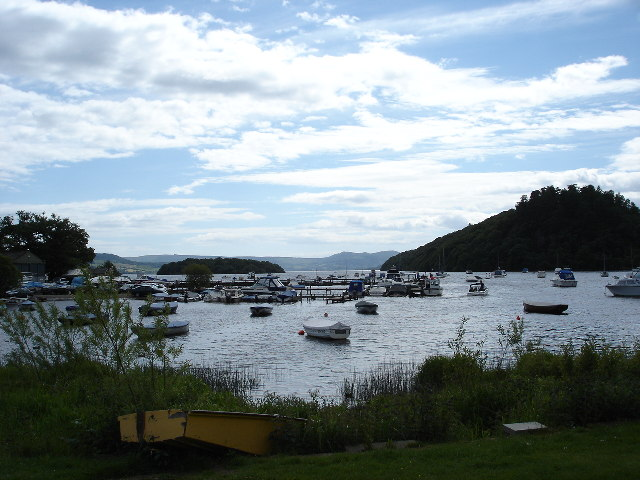 Balmaha Boat Yard